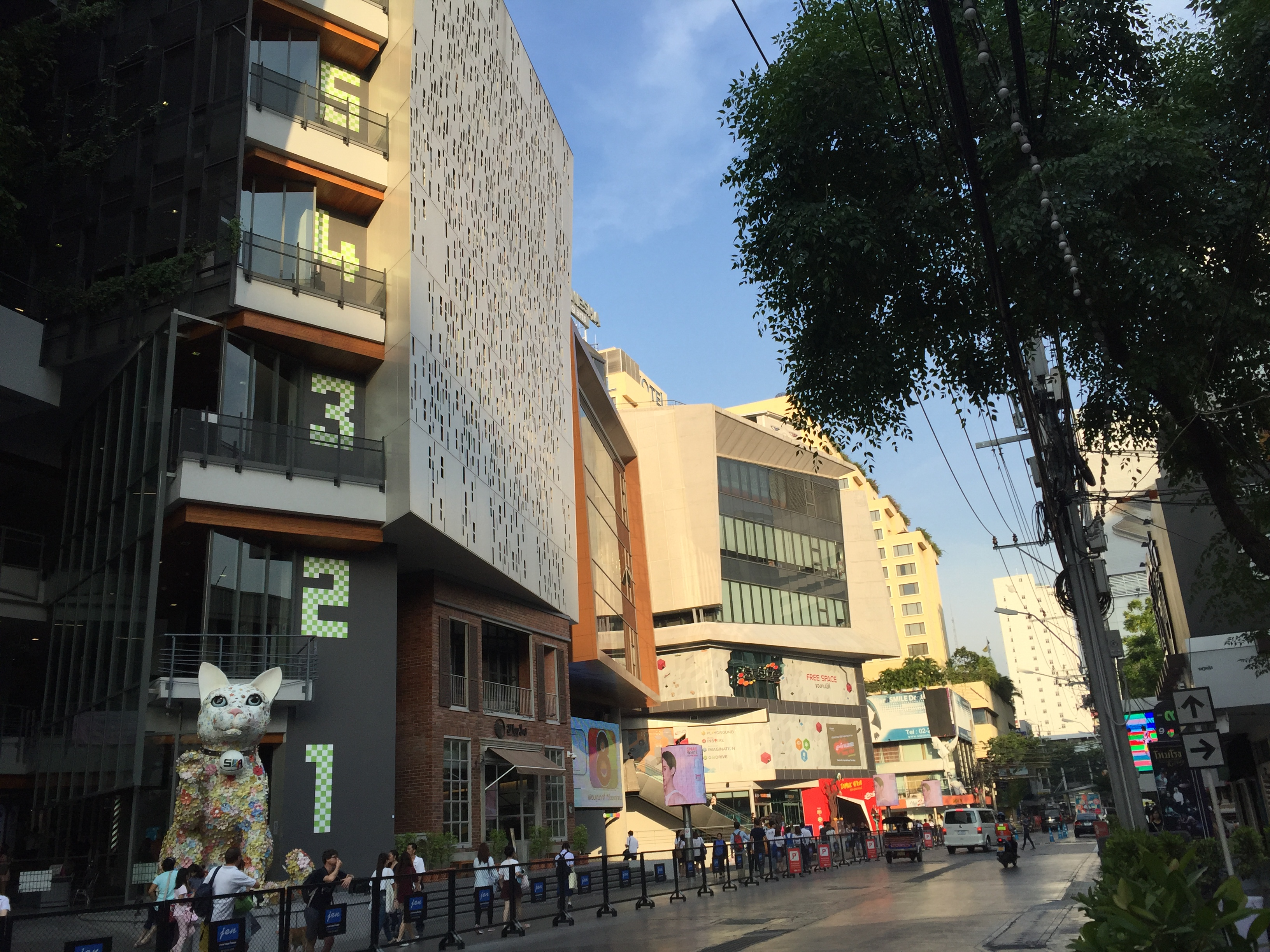 ใจกลางสยามสแควร์ ปี พ.ศ. 2558